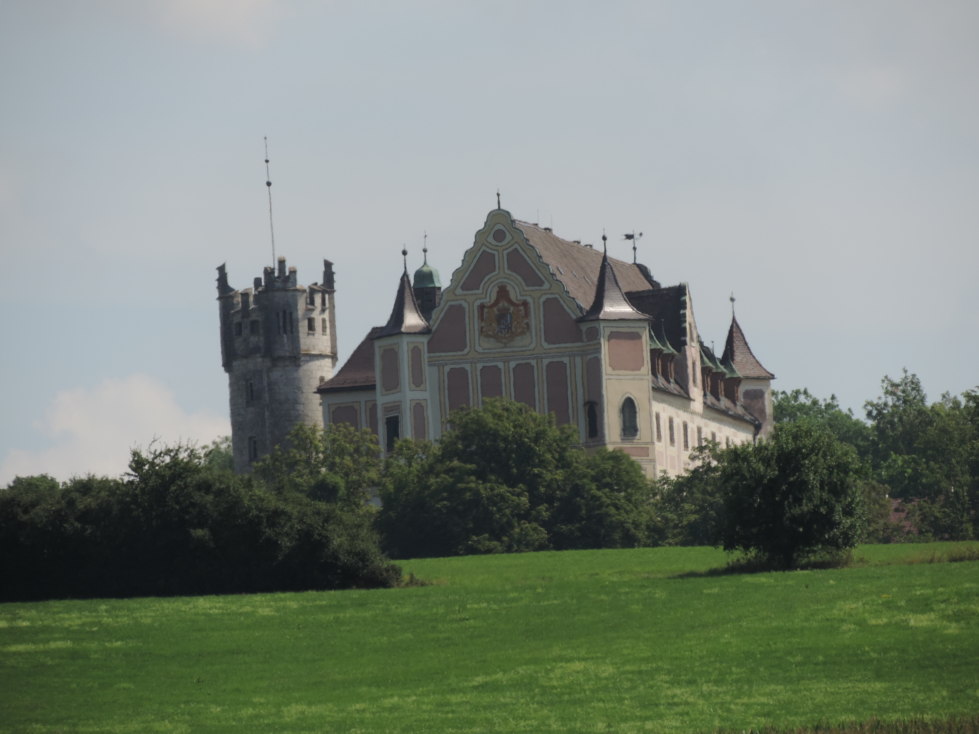 Westseite Schloss Taxis